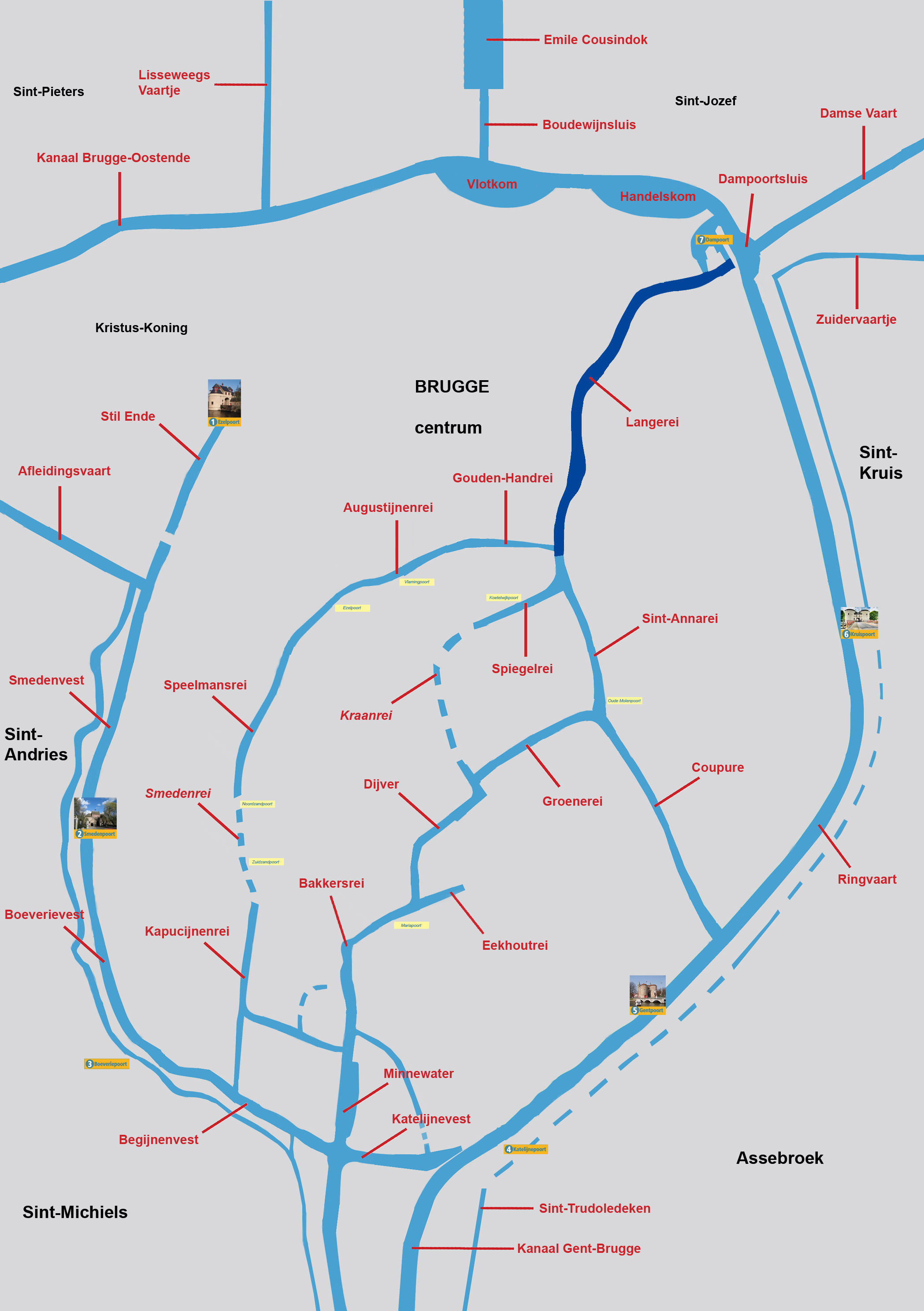 Situering van de Langerei